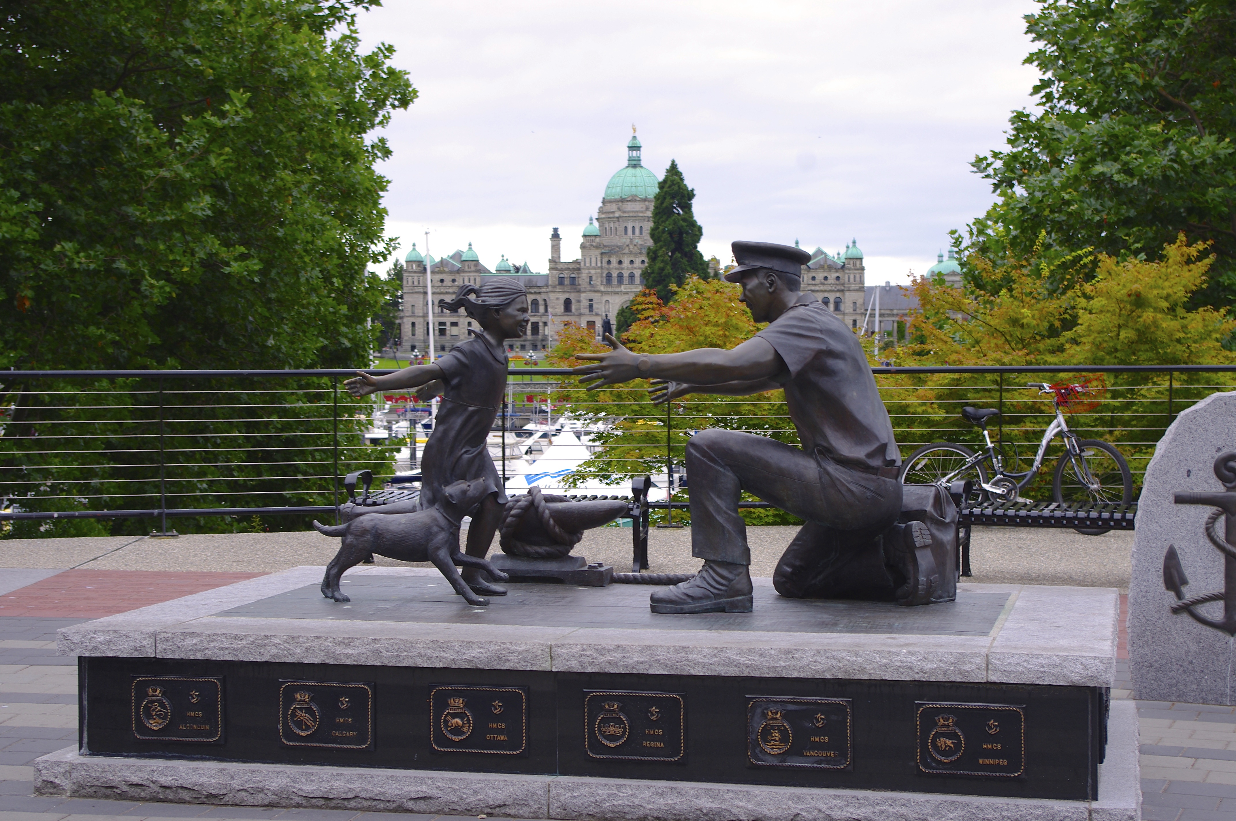 Monument dédié à la marine canadienne.